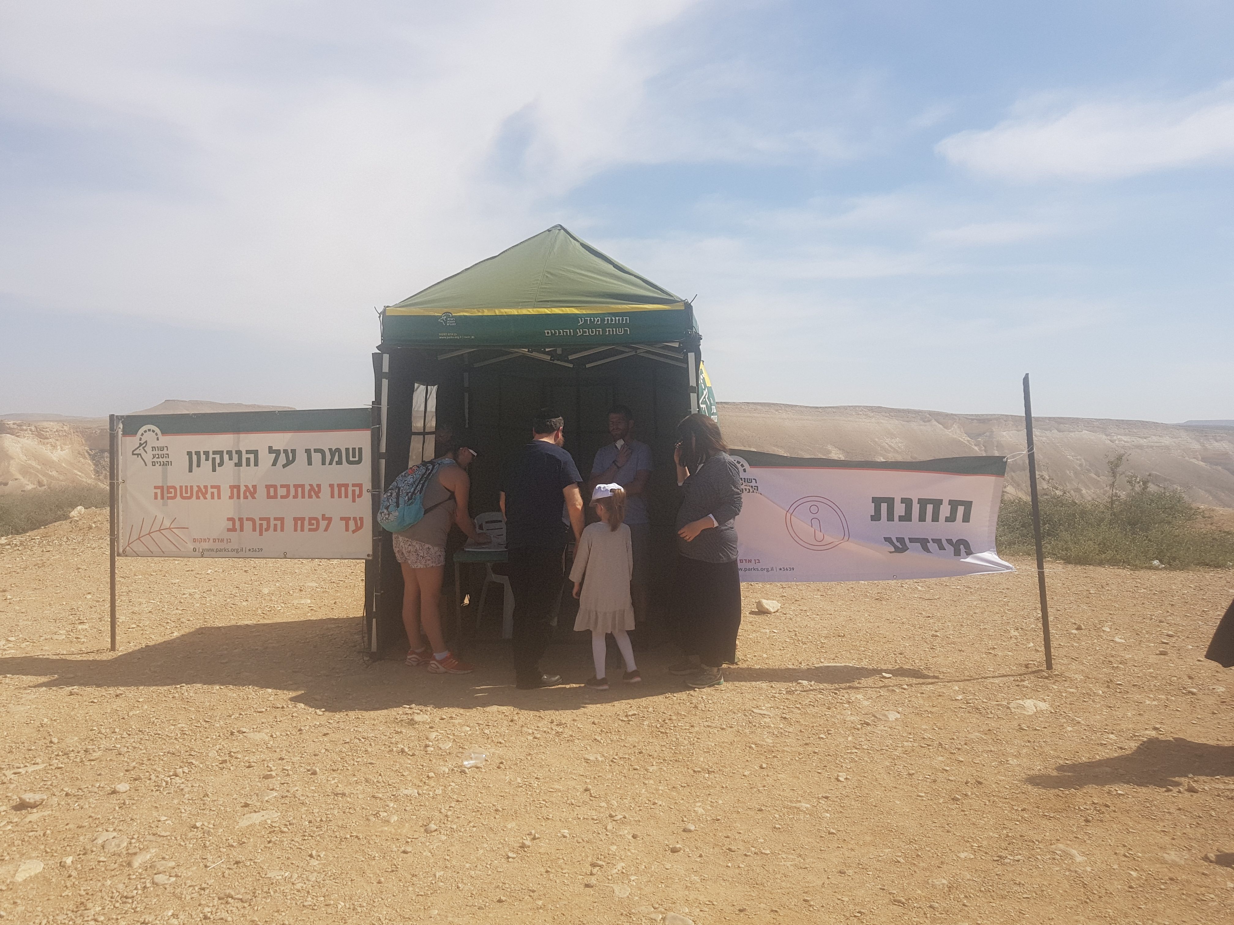 עמדת מידע של רשות הטבע והגנים